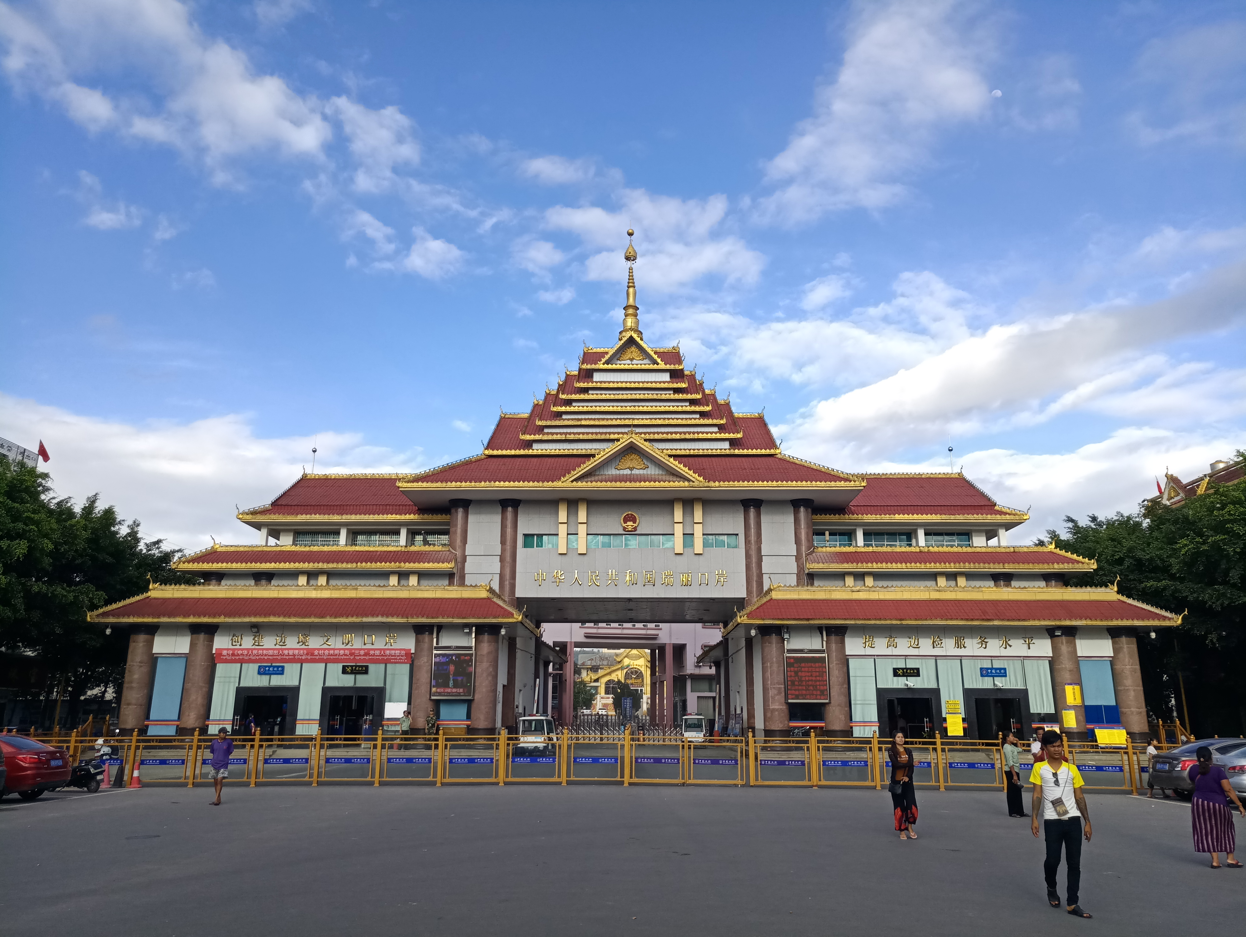 中文（中国大陆）: 中缅边界瑞丽口岸